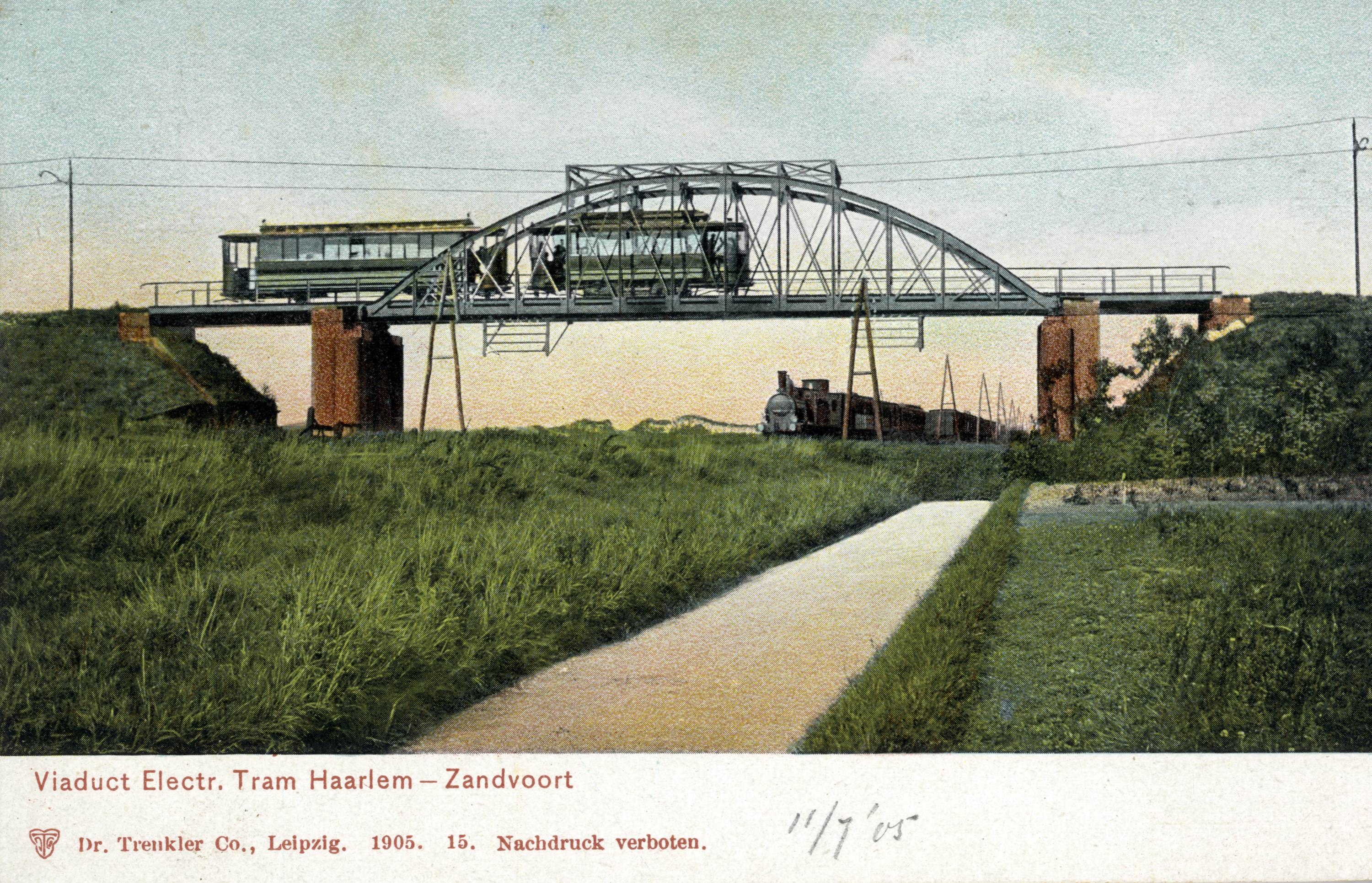 Viaduct van de Electrische Tram Haarlem - Zandvoort over de spoorlijn Haarlem - Leiden bij Heemstede; circa 1905. Collectie van het Utrechts Archief.